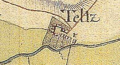 Telz auf der Schmettau'schen Karte von 1767-87, Telz, Stadt Mittenwalde, Brandenburg, Deutschland